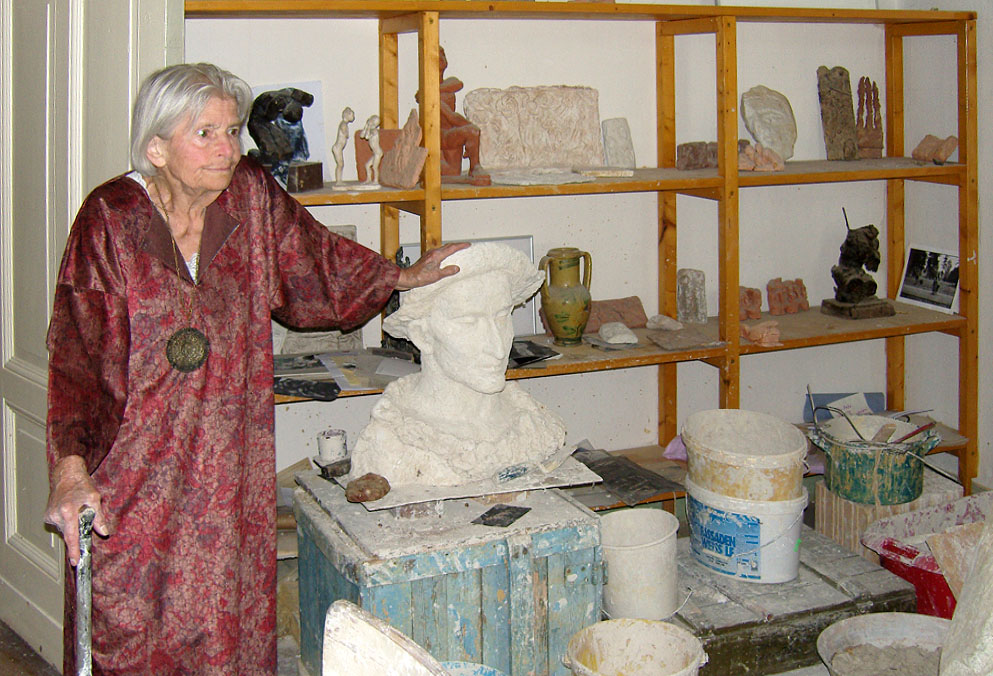 Ingeborg Hunzinger im Atelier ihres Wohnhauses, Fürstenwalder Allee 12, Berlin-Rahnsdorf, 2008